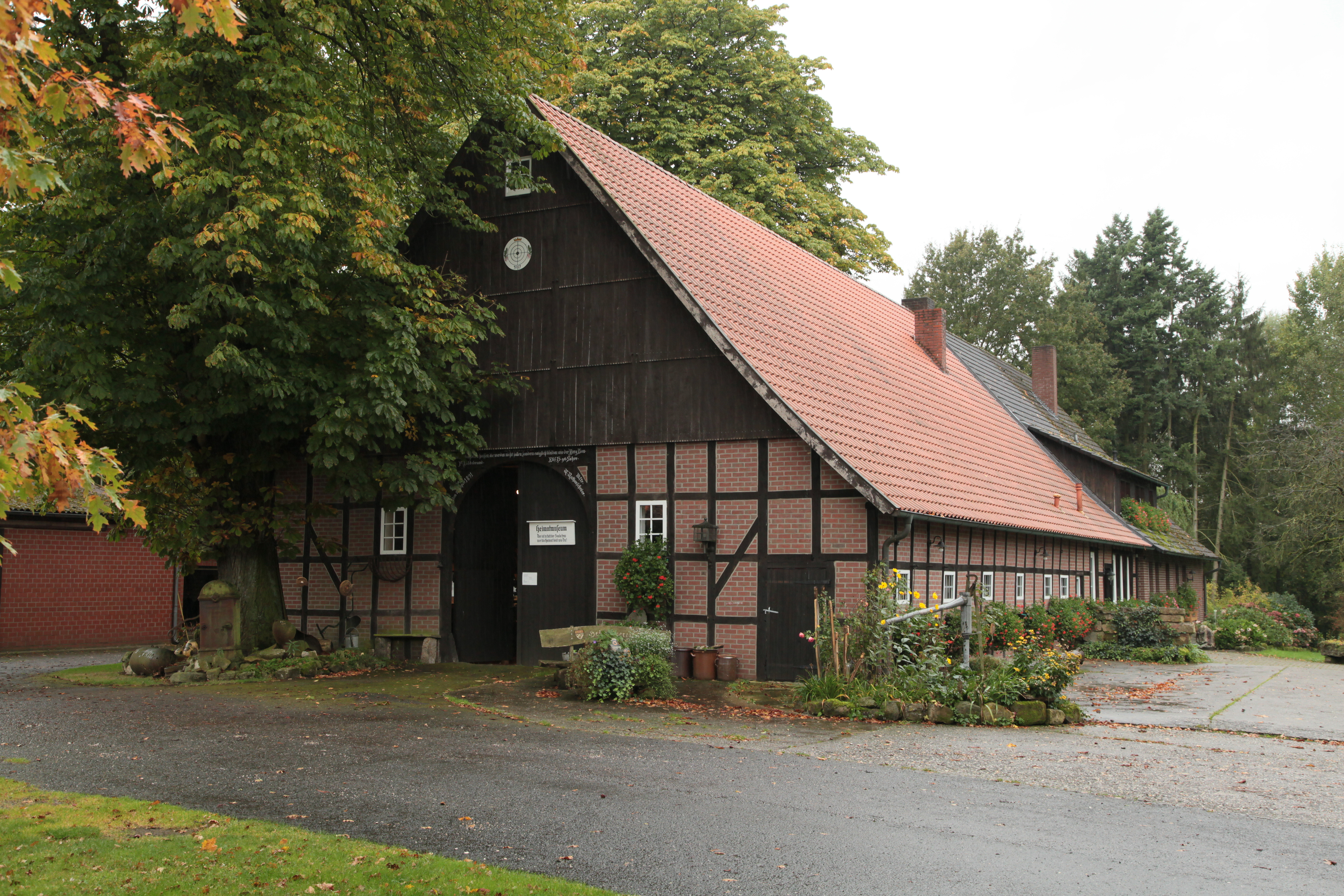 Heimatmuseum im Hof Jasper-Hildebrand, Am Aabach 9 in Ladbergen